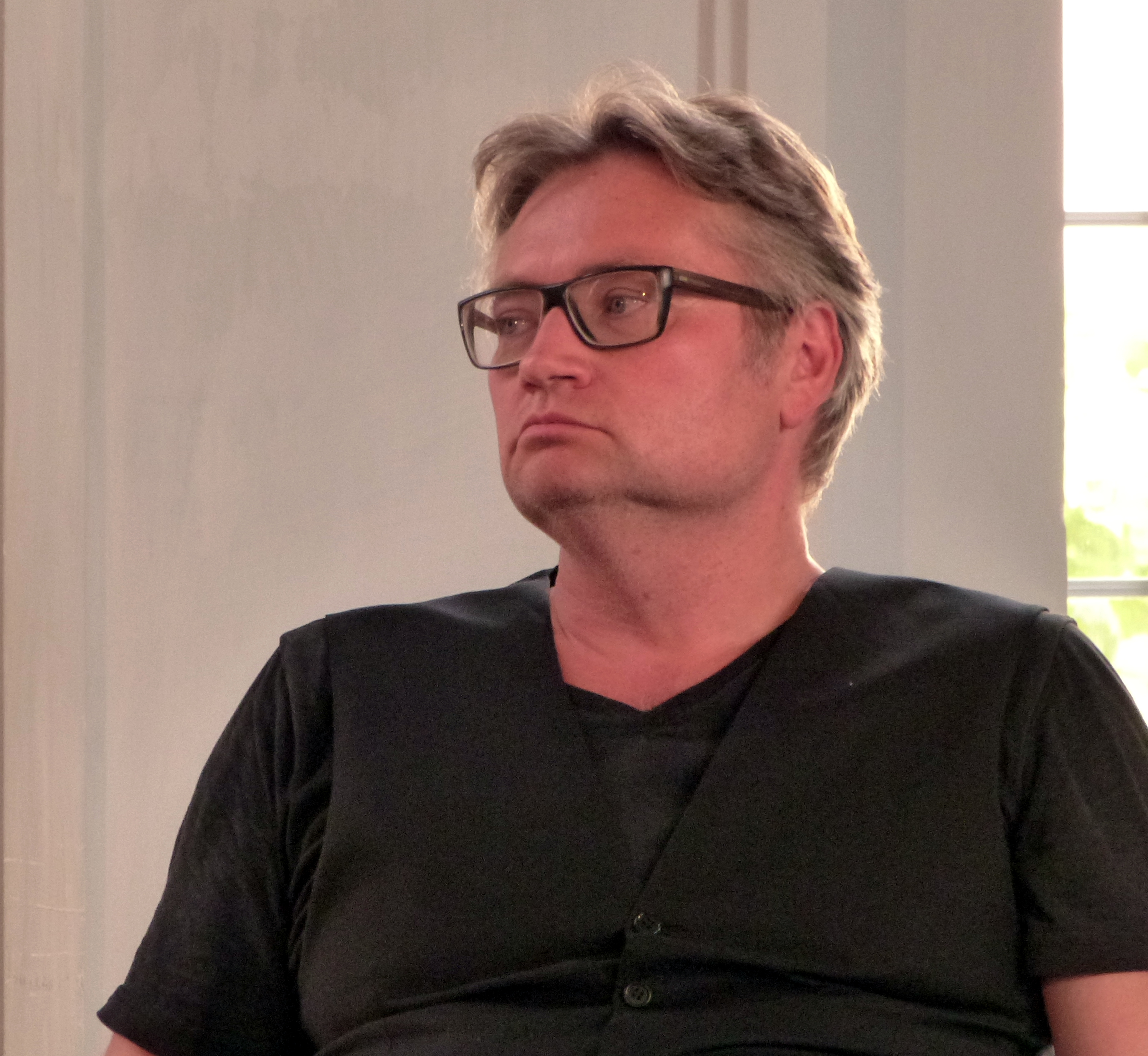 Der Kultursoziologe Thomas Wagner bei einer Diskussionsrunde auf dem Erlanger Poetenfest 2017.